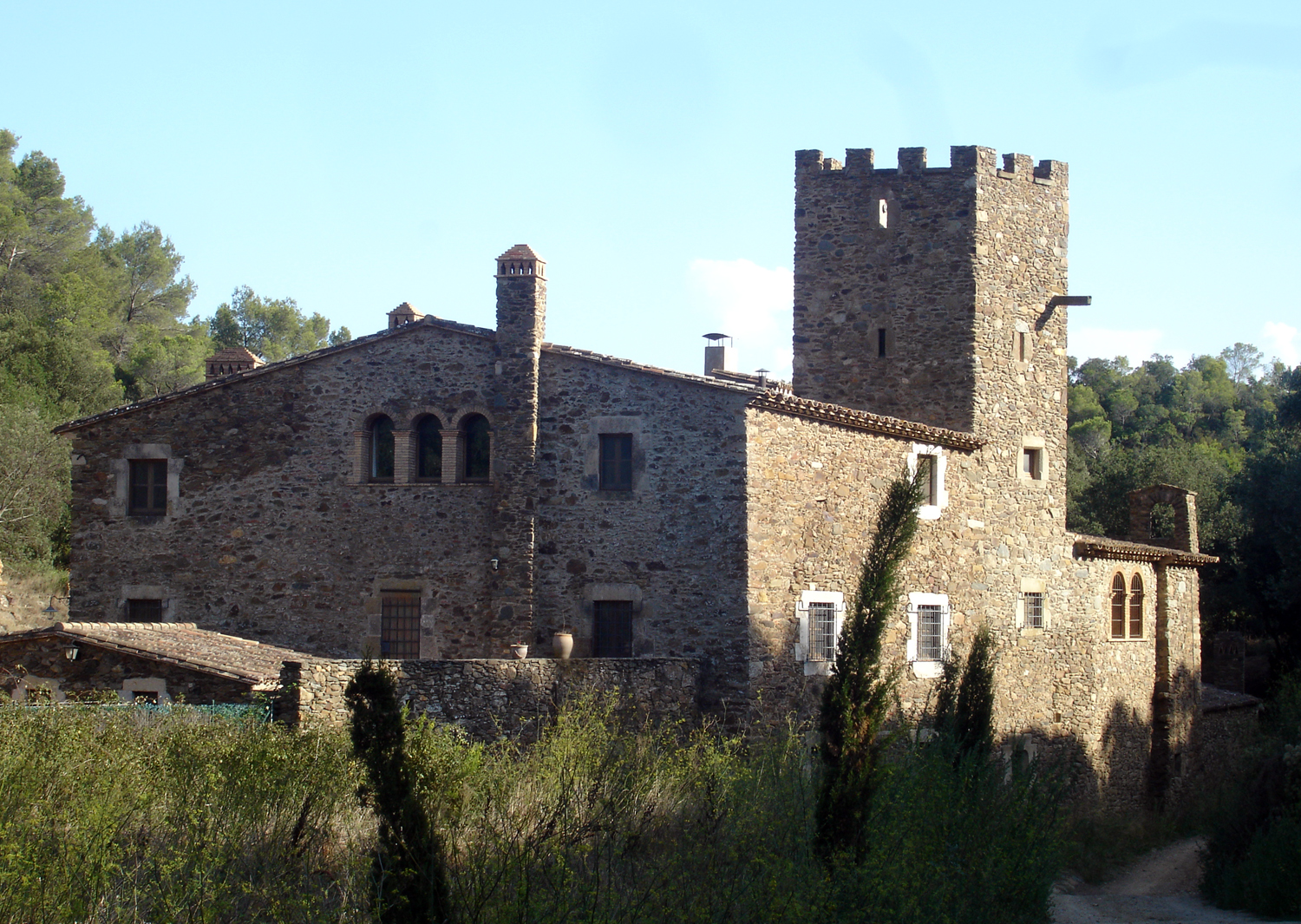 Un mas de Girona (Espanya).